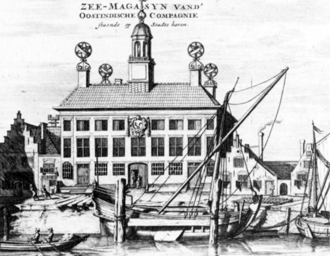 Zeemagazijn Delfshaven of VOC Chamber of Delft